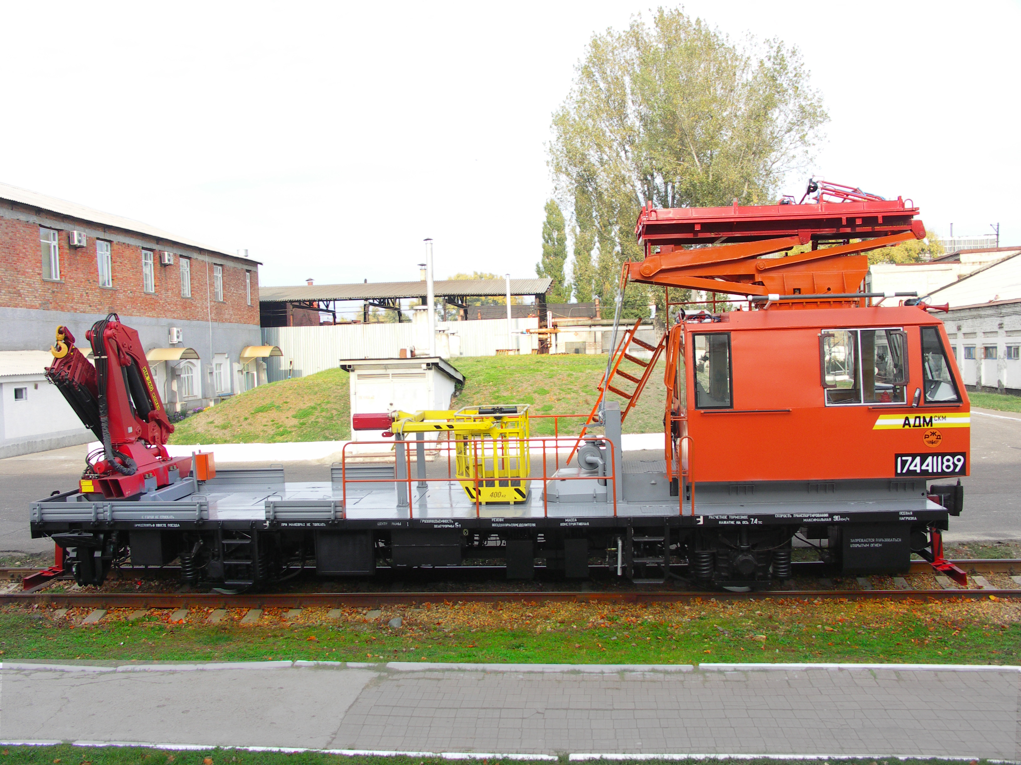 Монтажно-восстановительная автомотриса АДМскм 2-го исполнения, производства ОАО Тихорецкий машиностроительный завод им. В.В. Воровского